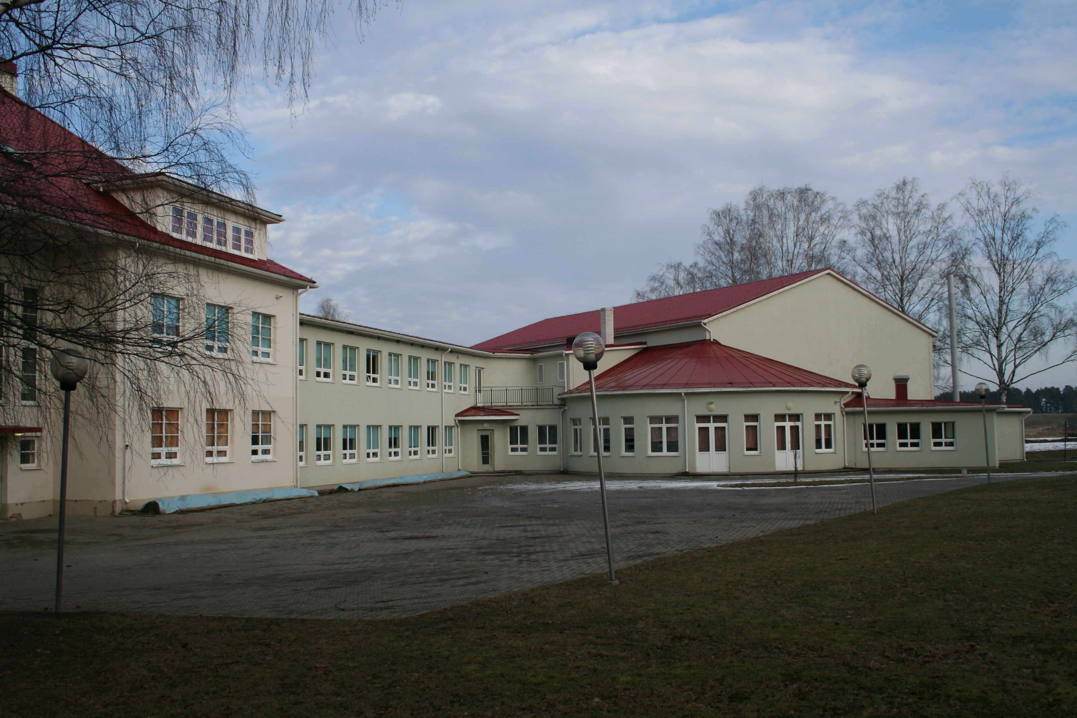 Kääpa põhikool